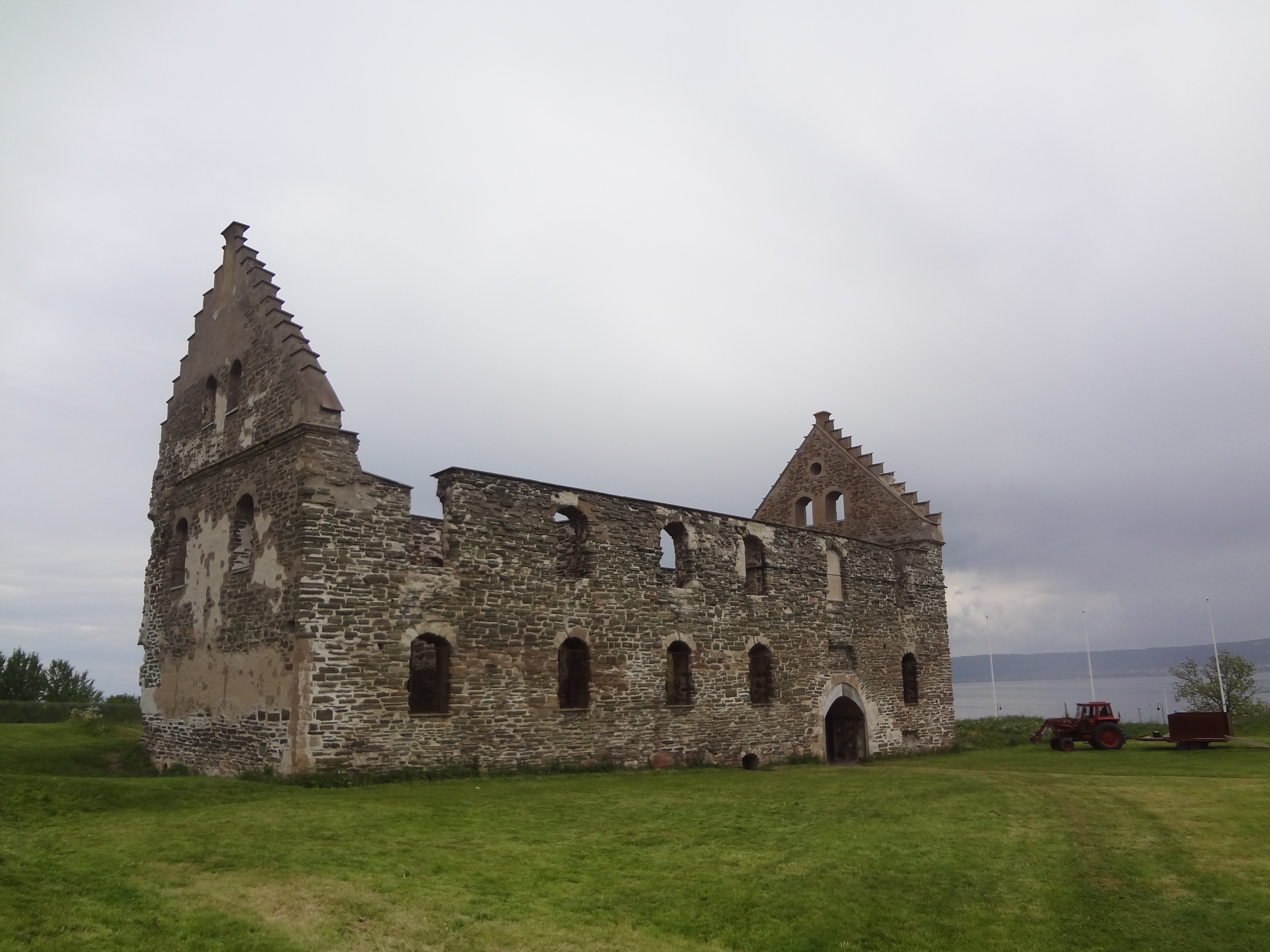 Visingsö uhartearen gaztelu bat.